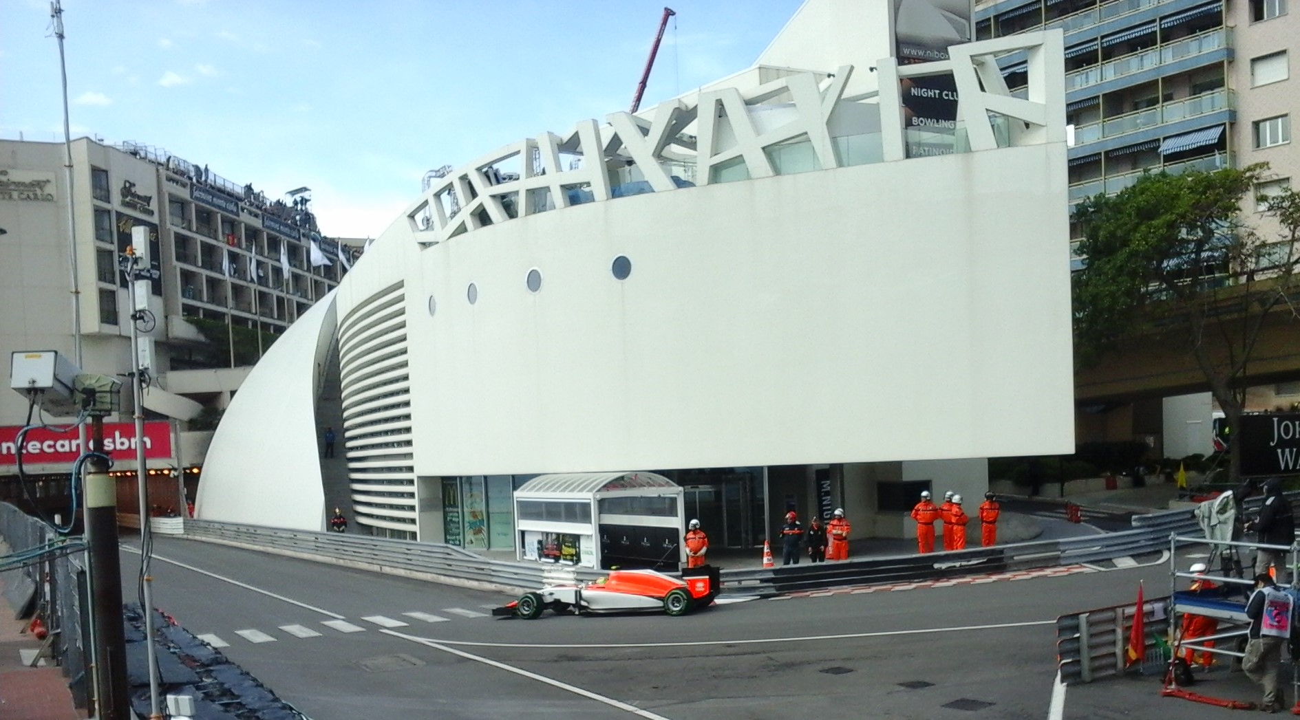 Roberto Merhi al volante della Marussia durante le Prove Libere del Gran Premio di Monaco 2015.